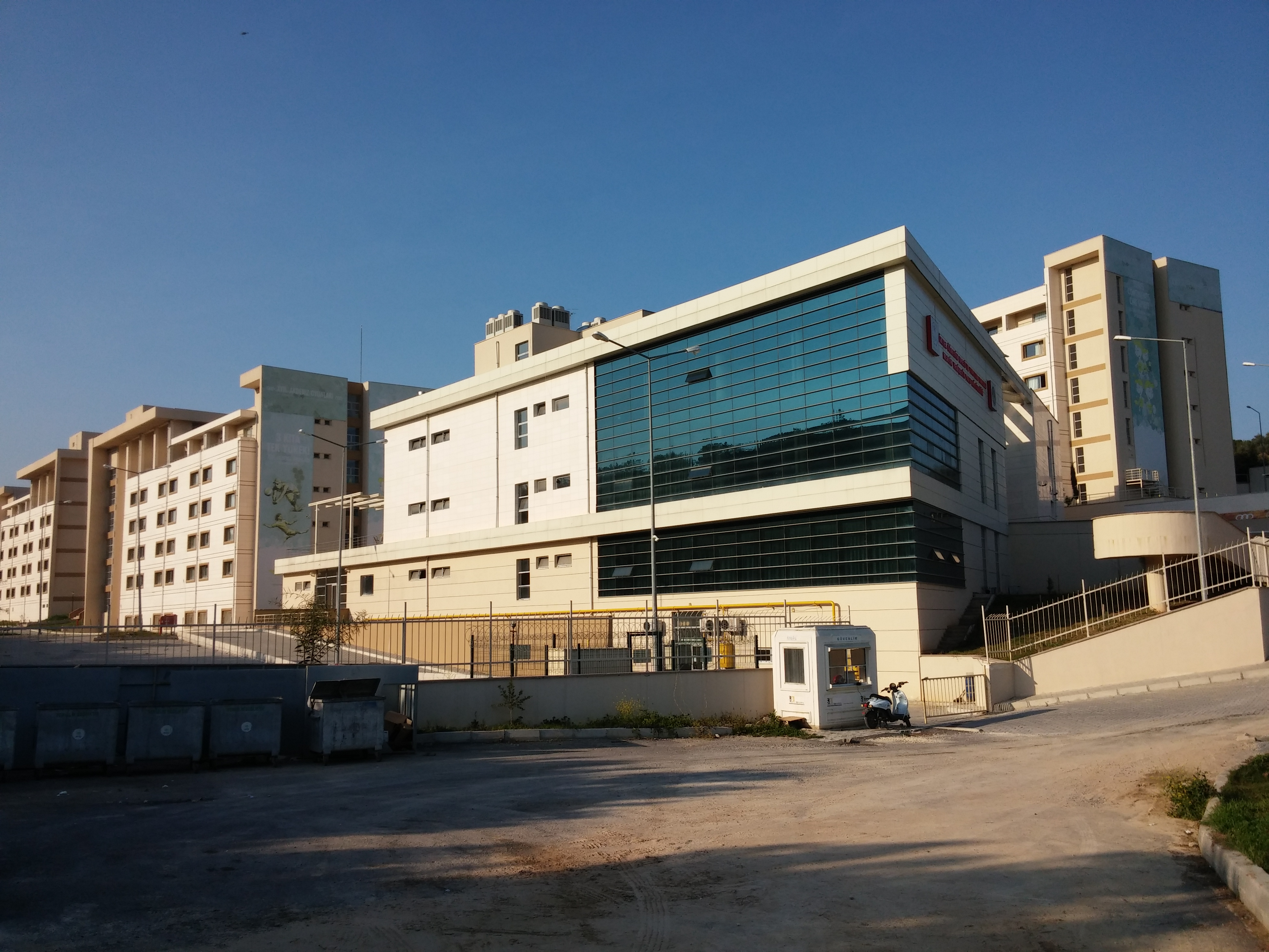 Mersin Üniversitesi Çiftlikköy Kampüsü içerisinde yer alan devlet erkek öğrenci yurdu.